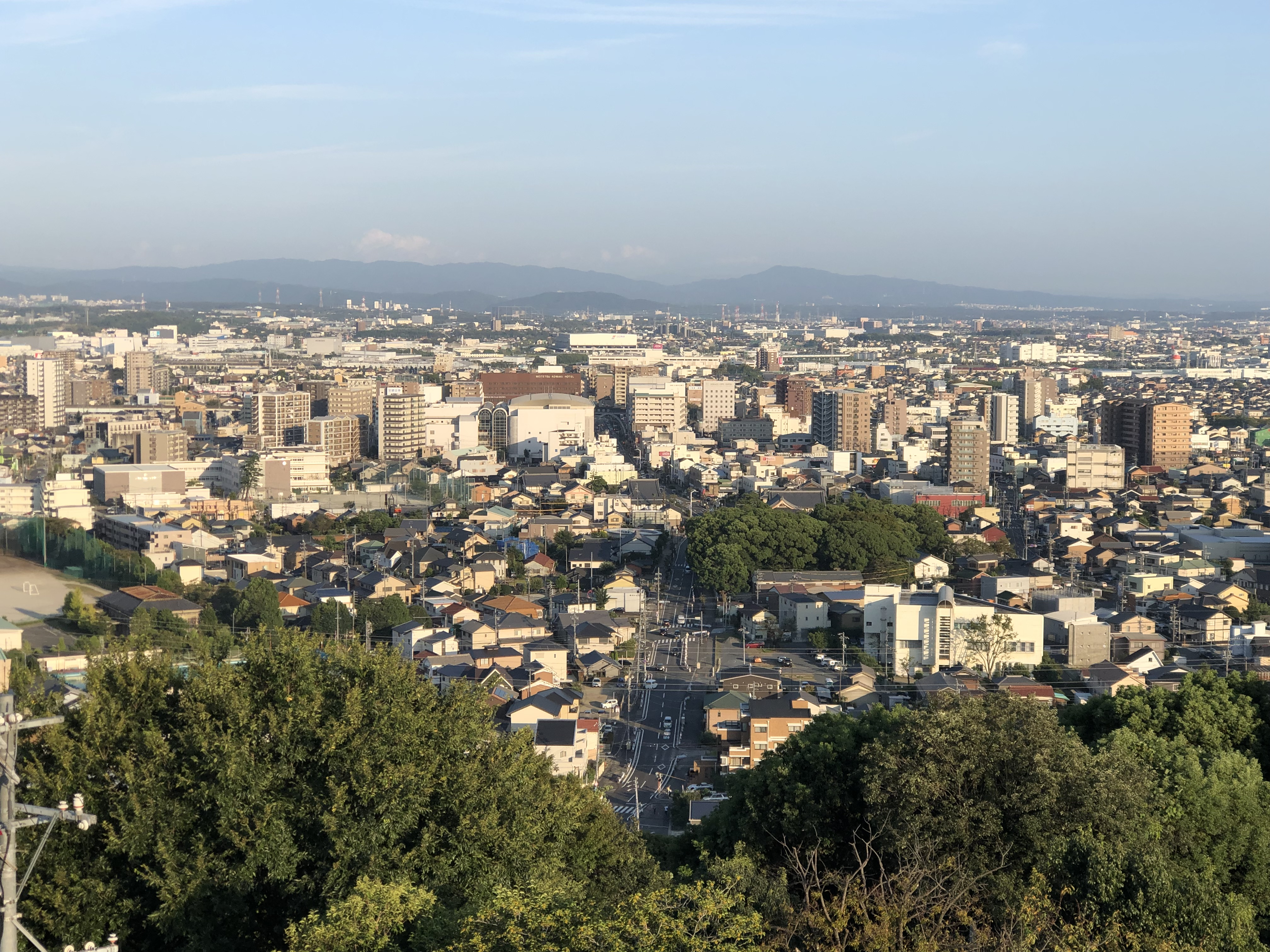 小牧山城模擬天守閣から見た小牧駅周辺